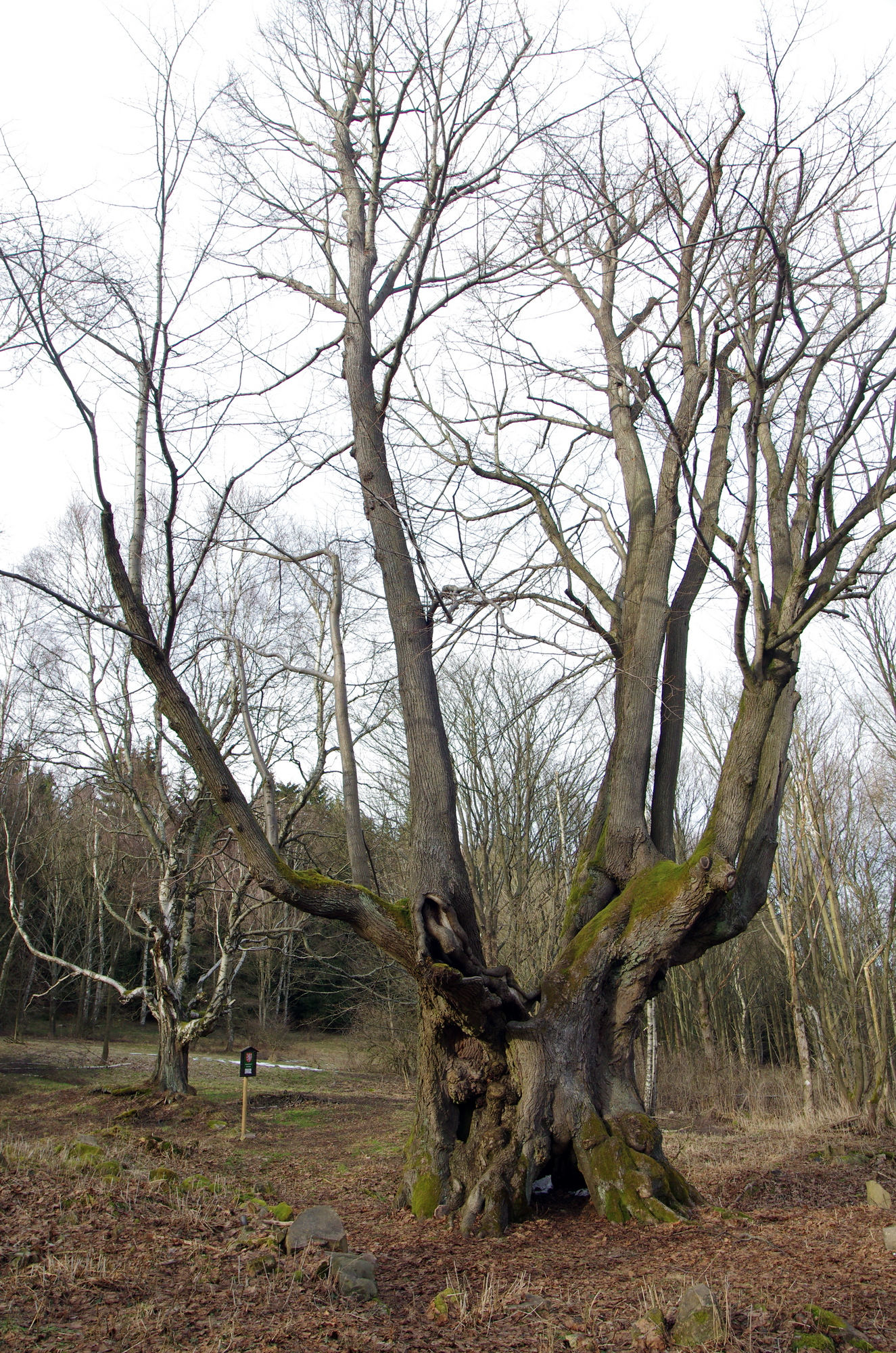 Památný strom Horní Popovská lípa, (v pozadí jiný památný strom Popovská bříza), okres Karlovy Vary